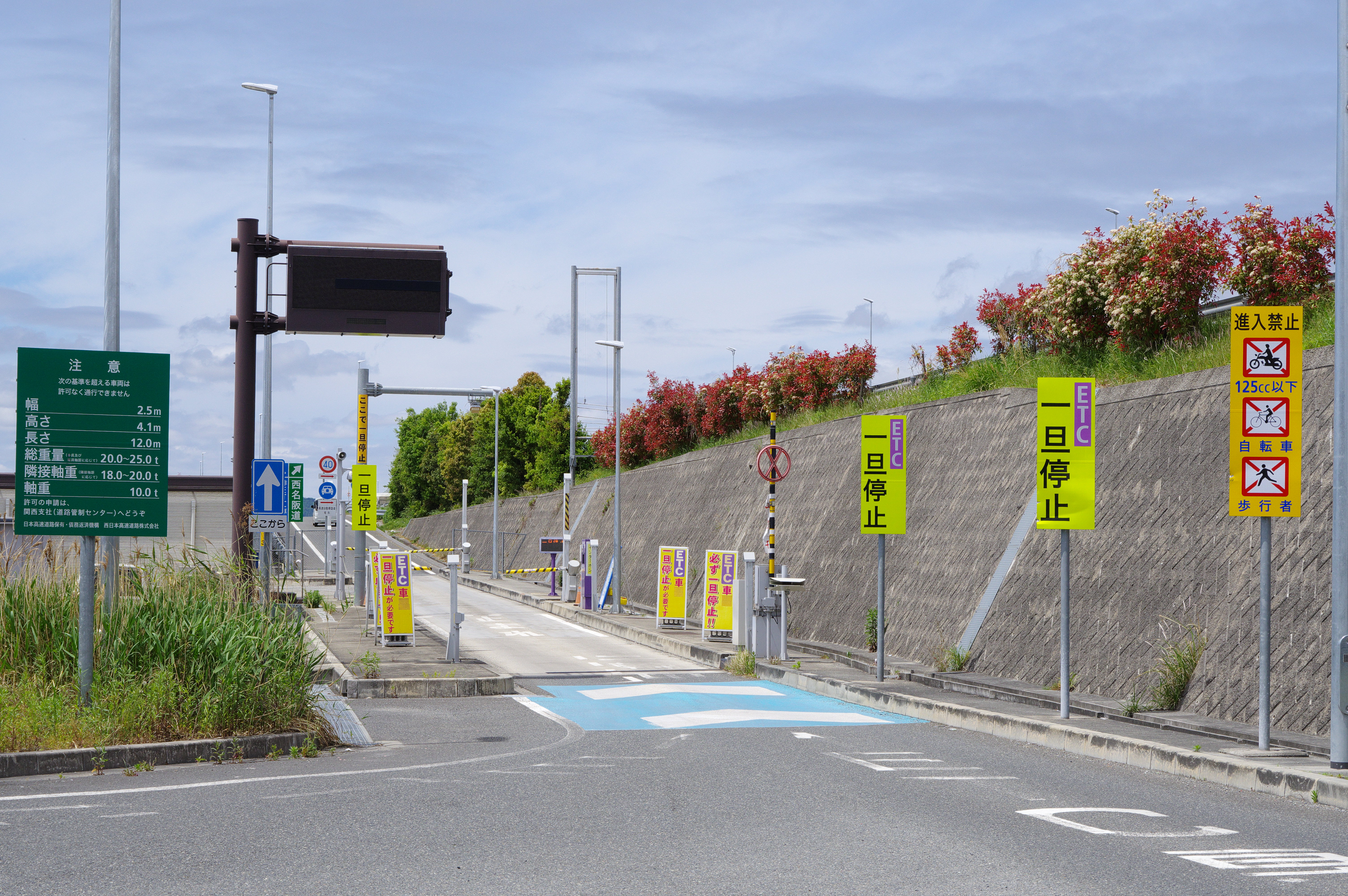 西名阪自動車道 大和まほろばスマートインターチェンジ 奈良県大和郡山市